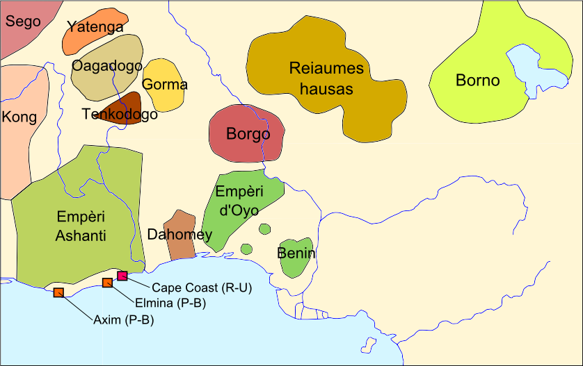 Estats principaus dau Golf de Guinèa vèrs la fin dau sègle XVIII.